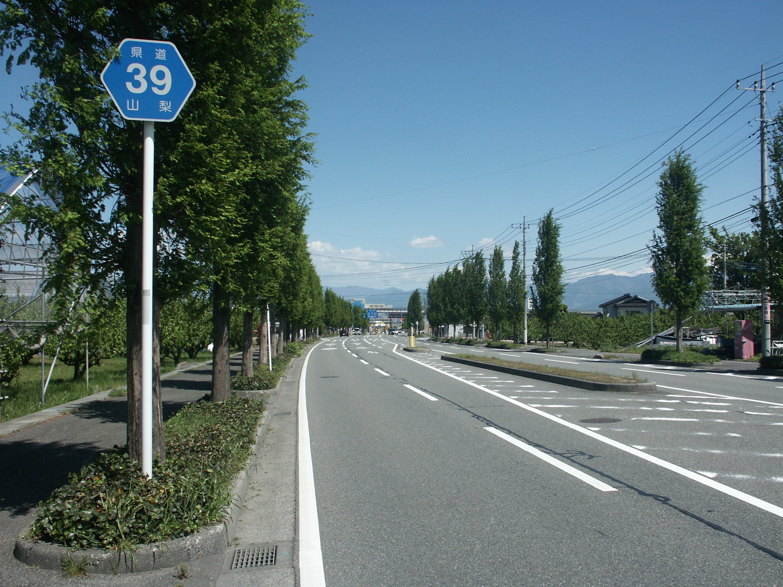 山梨県道39号線南アルプス市谷在塚付近（甲府方面を撮影）